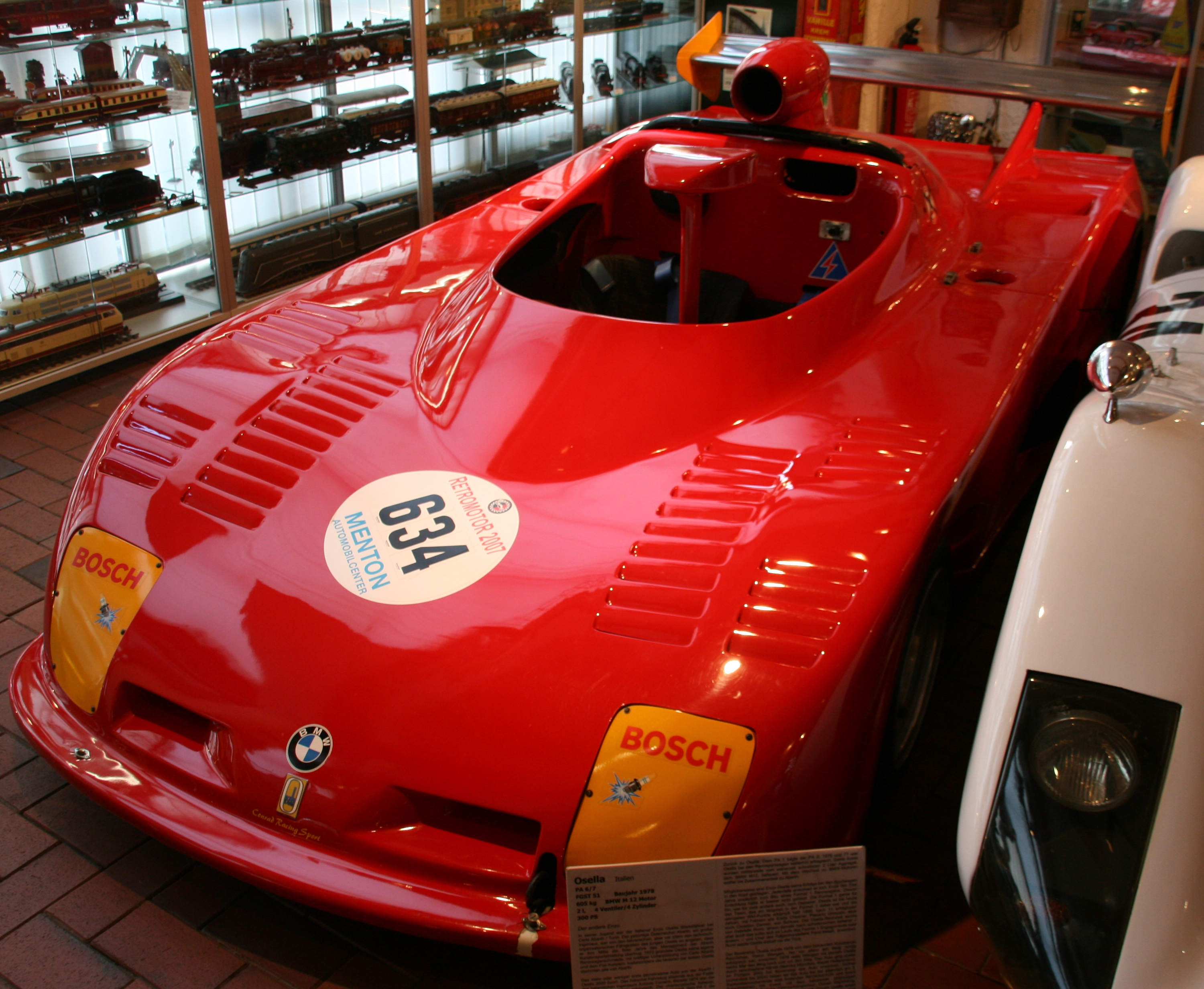 Osella PA6/7 im Boxenstop Tübingen